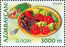 Dolma